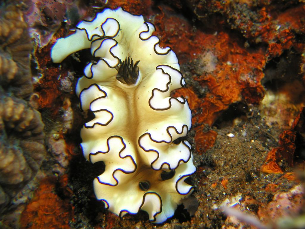 Doriprismatica atromarginata (Cuvier, 1804) (synonym: Glossodoris atromarginata )